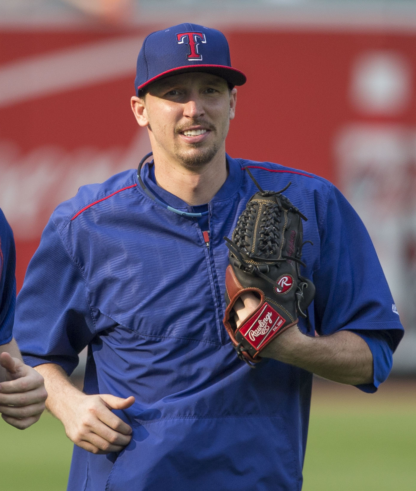 Tanner Scheppers